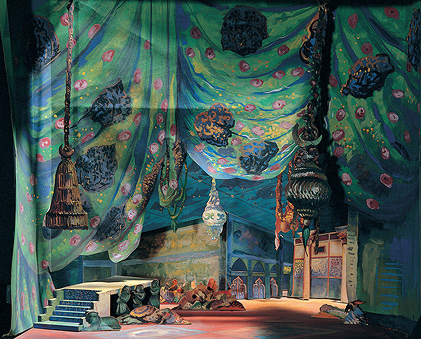 Макет декорации к балету «Шехерезада» по эскизу Л. Бакста